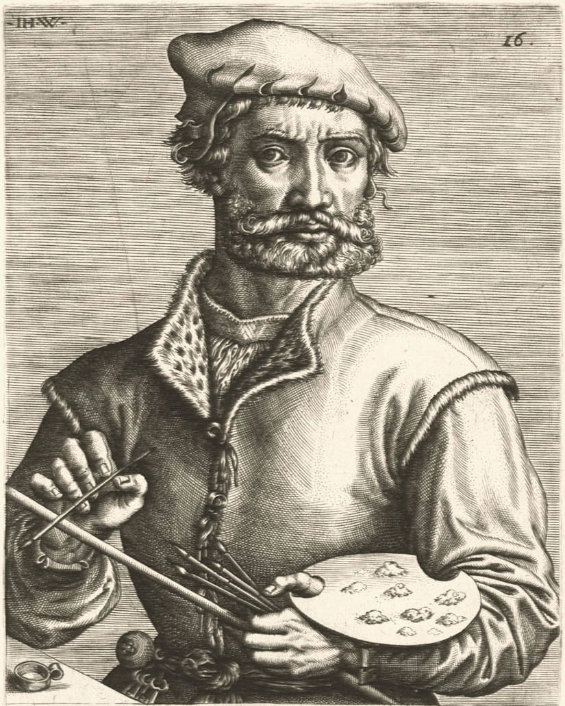 Portrait of Pieter Coecke van Aelst [detail].